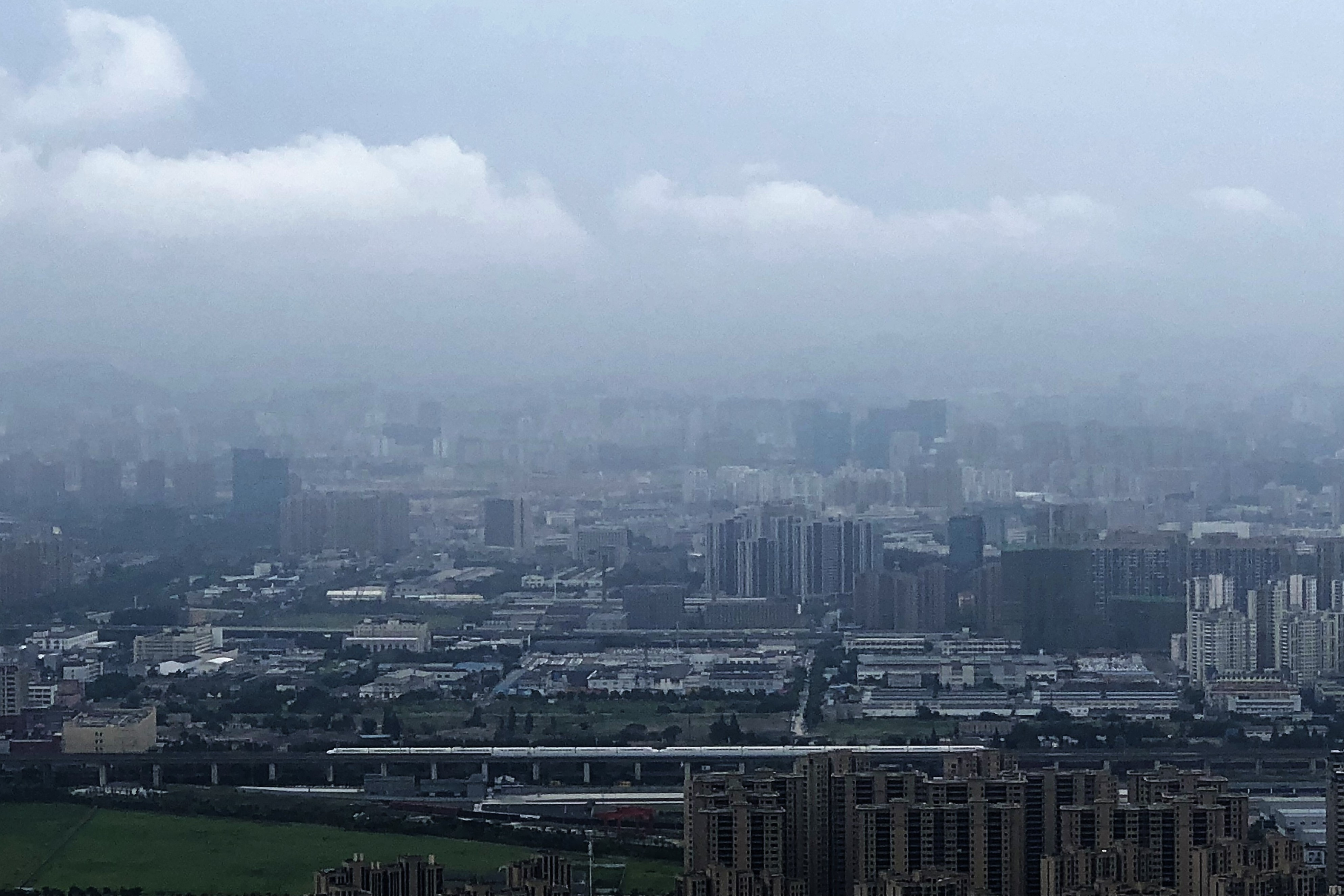 中文（中国大陆）: 望宸阁眺望拱墅区